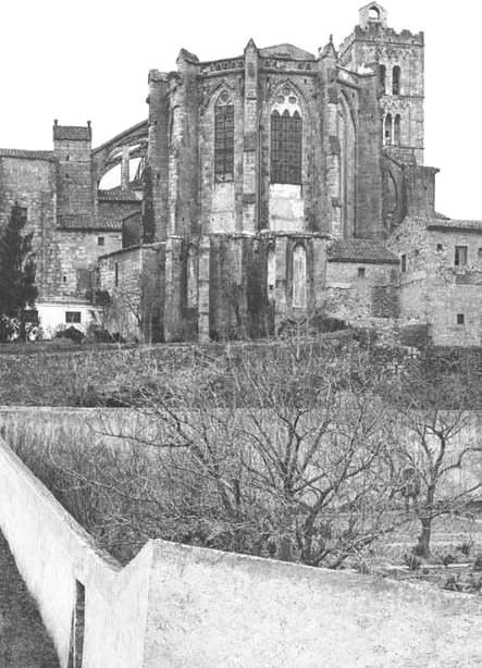 Imatge